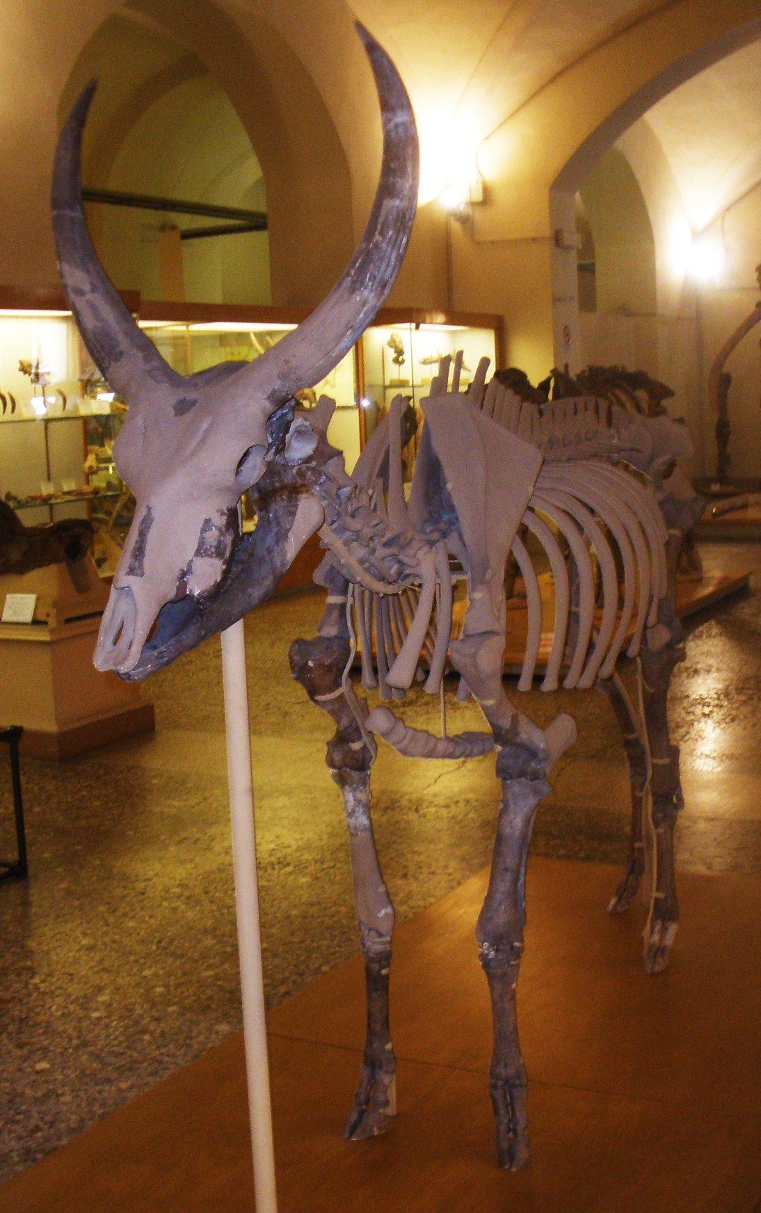 Fossil of Leptobos, an extinct mammal- Took the picture at Museo di Paleontologia di Firenze